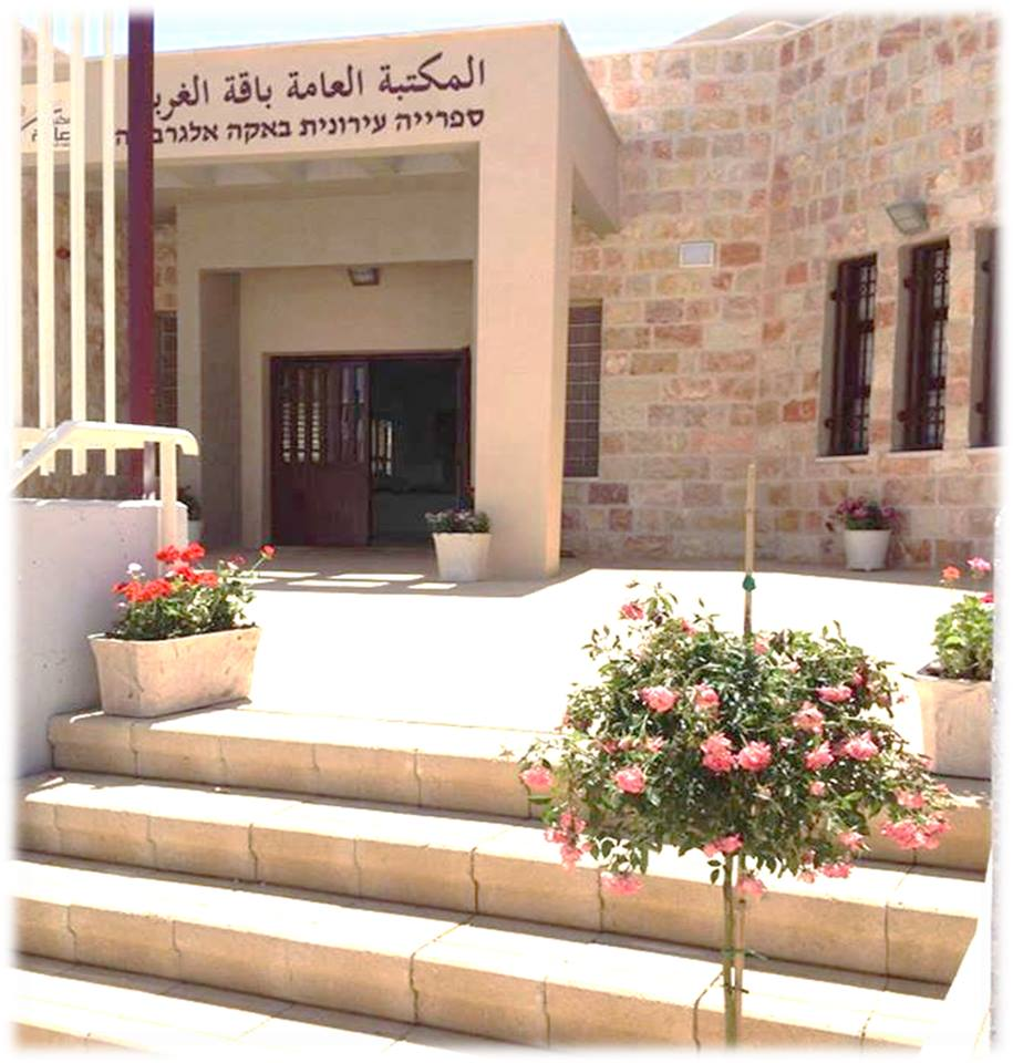 ספרייה עירונית באקה אלגרבייה